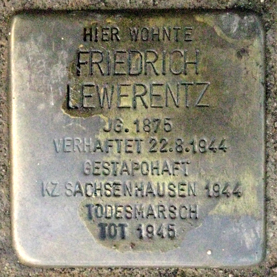 Stolperstein1-hammerschmidtplatz1-krefeld.jpg